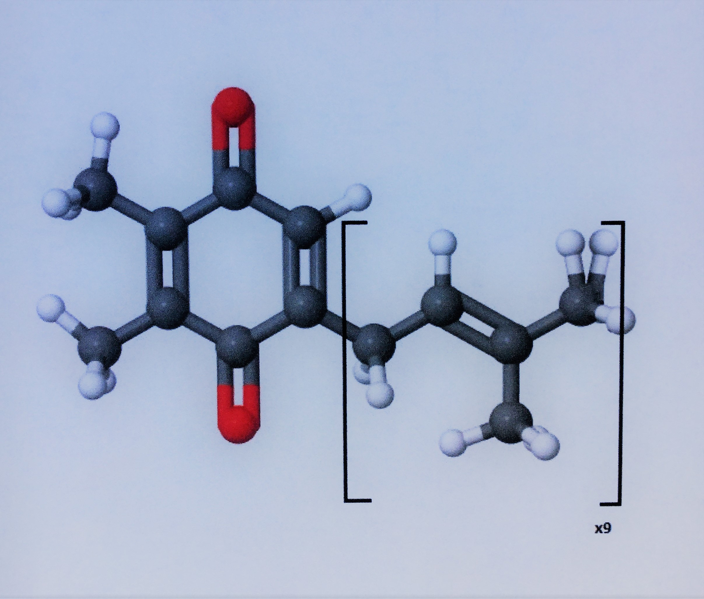 C55H60O2